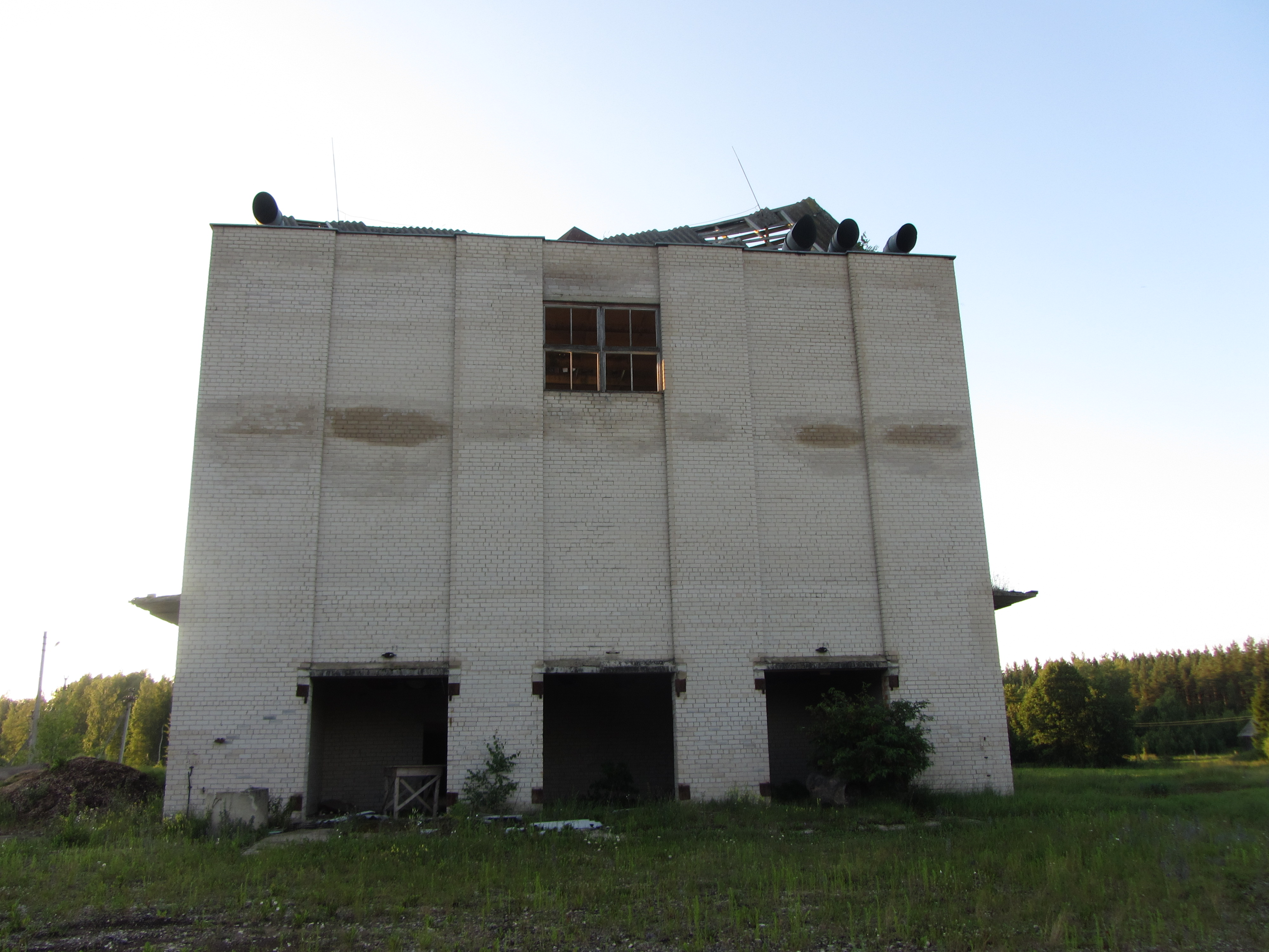 Štadviliai, Lithuania